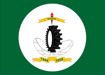 Bandeira do Município de Bayeux no estado da Paraíba, Brasil./ Flag of Paraíba's city Bayeux, Brazil